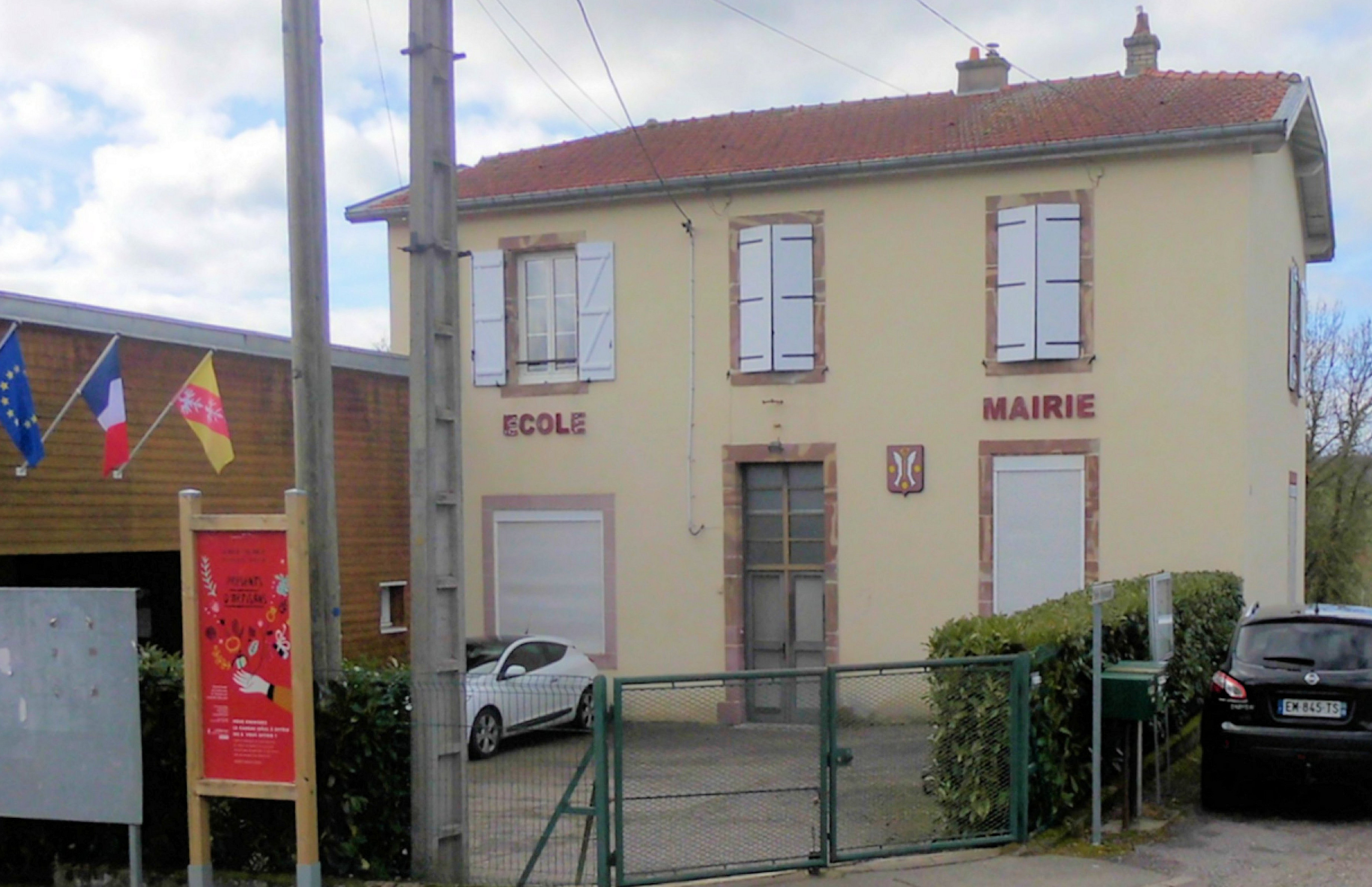 La mairie-école de Lamath